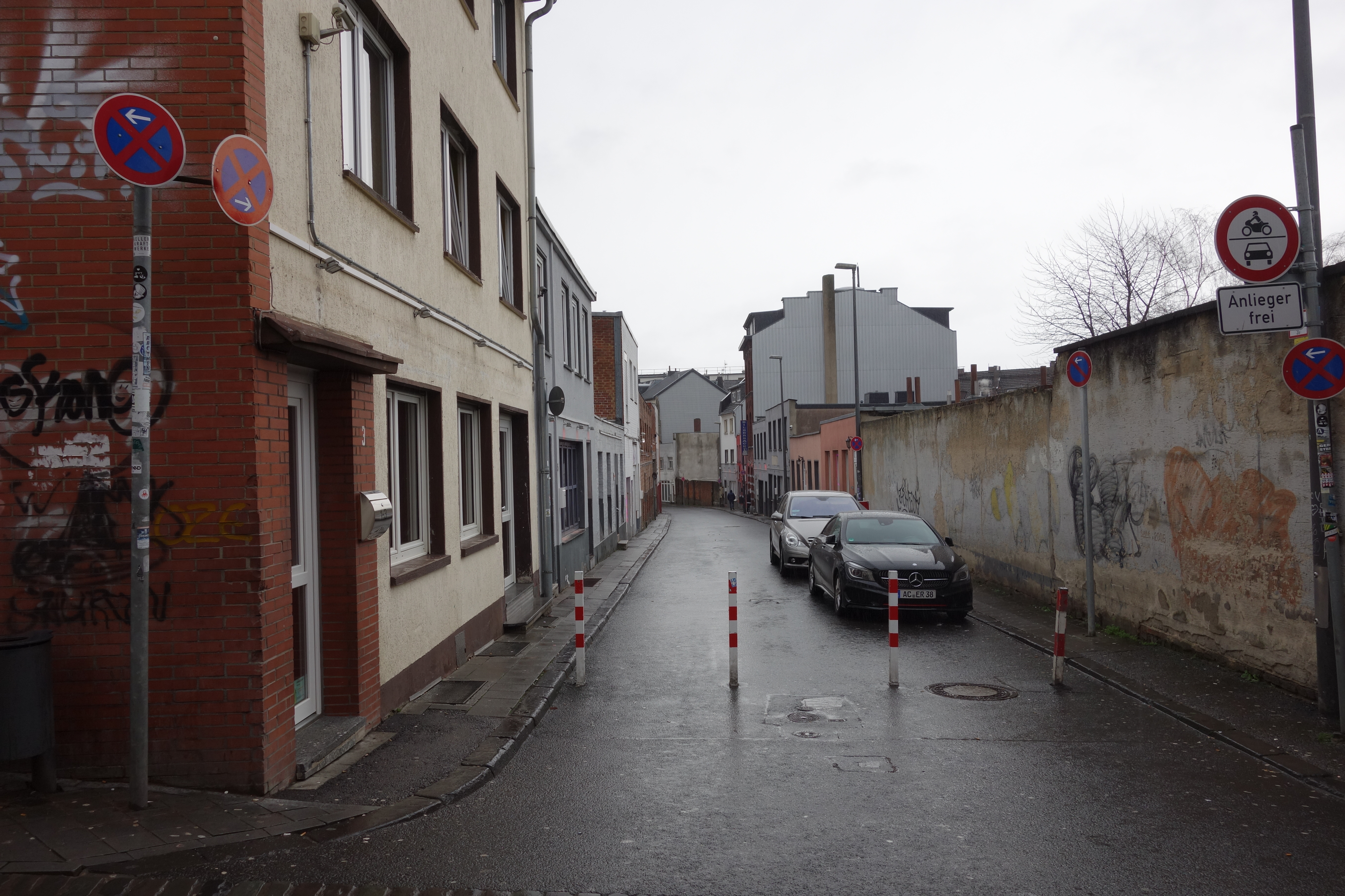 Blick in die Antoniusstraße, Aachen, von Südwesten (Nikolasstraße) aus